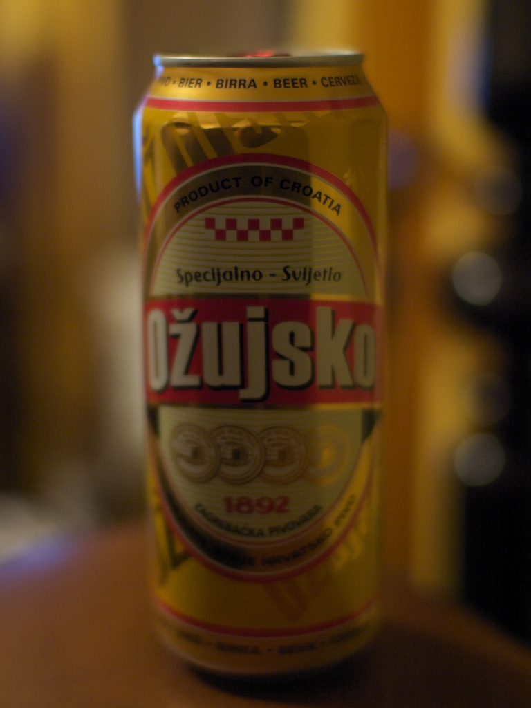 Ožujsko beer can